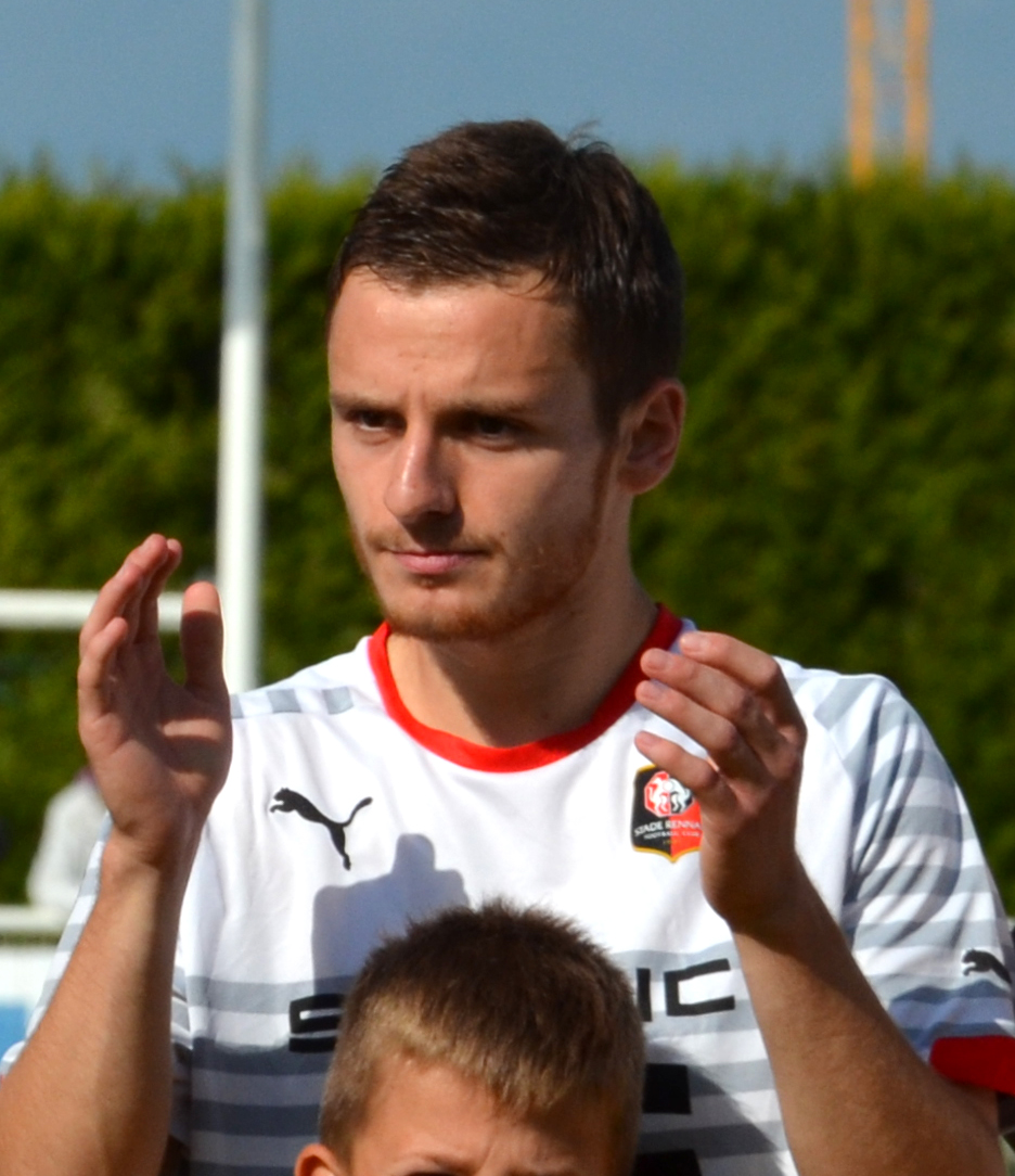 Photographie de Sébastien Salles-Lamonge lors d'un match de CFA2 opposant le FC Saint-Lô au Stade rennais le 23 mai 2015.